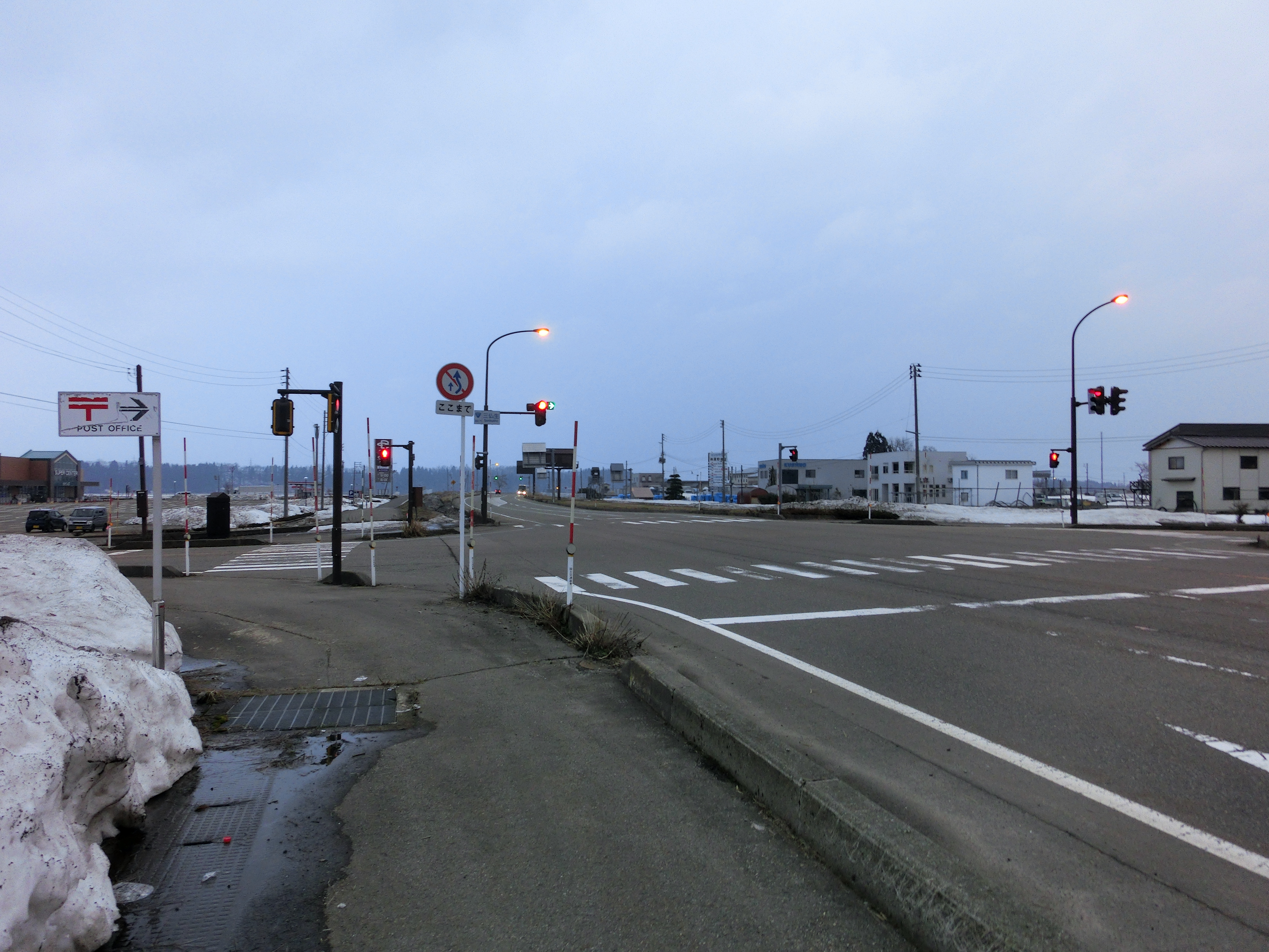 この画像は2018年3月25日早朝、新潟県小千谷市三仏生（一般国道17号線歩道上）にて撮影された三仏生交差点の写真。 Casio Exilim EX-ZR200